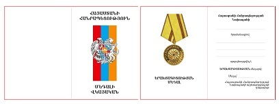 Երախտագիտության մեդաի վկայական